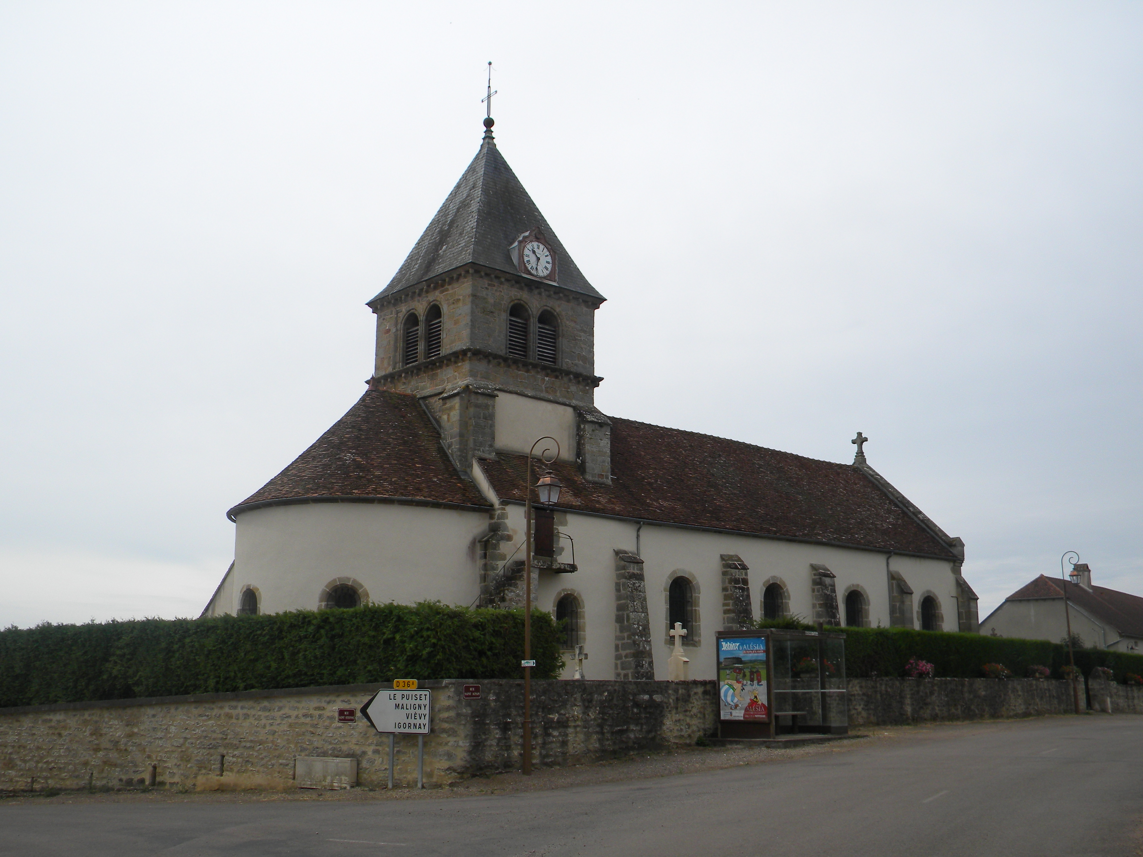 La preĝejo de Magnien